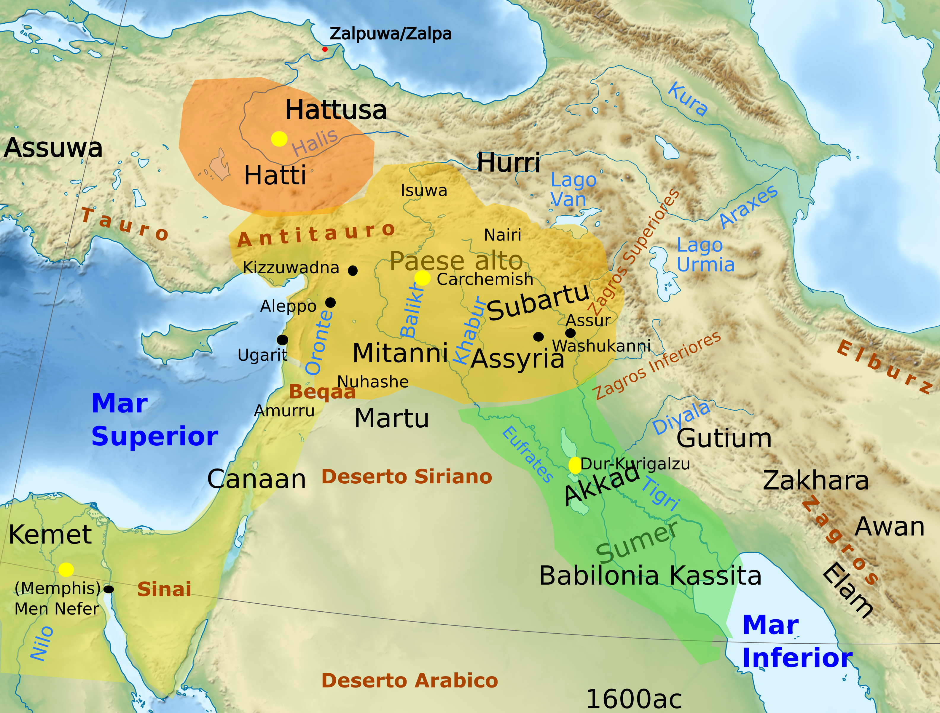 Ubicacion probable de Zalpuwa / Zalpa